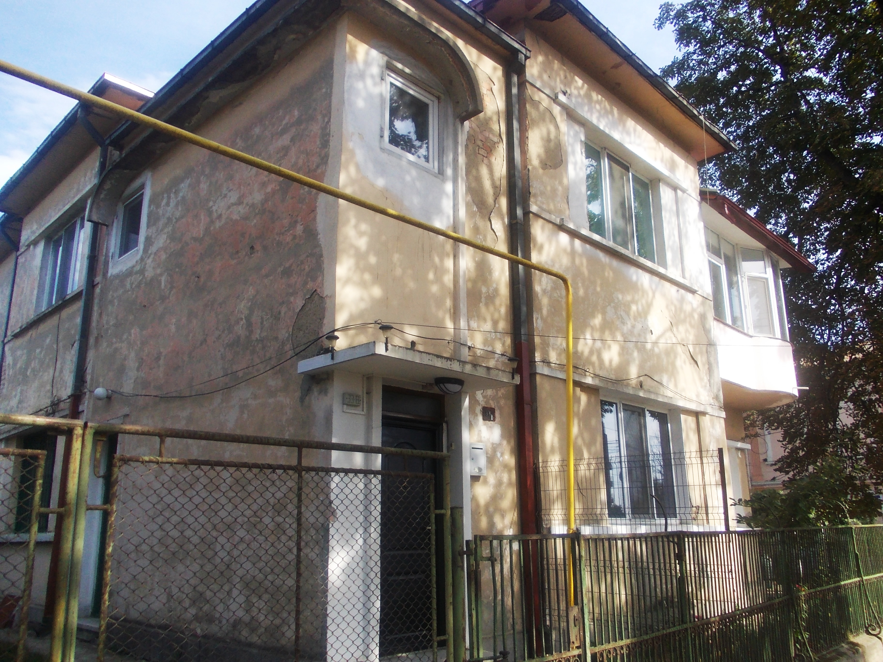 municipiul Iași, Str. Elena Doamna 33